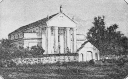 Беларуская (тарашкевіца): Даўгінаў (Daŭhinaŭ), пляц Рынак (plac Rynak). Касьцёл